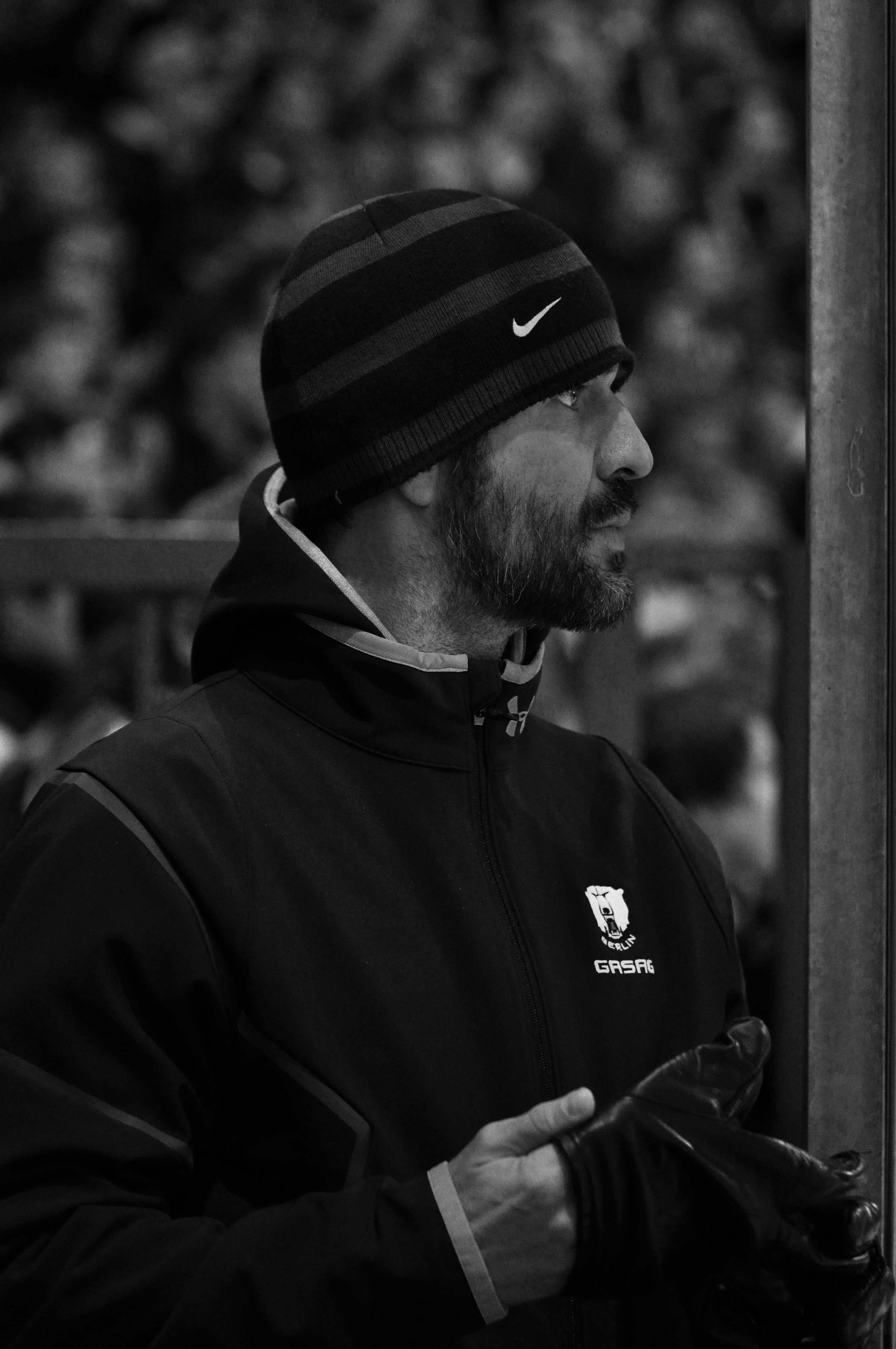 Denis Pederson, Straubing Tigers - Eisbären Berlin 11.04.2012, DEL PlayOff Halbfinale